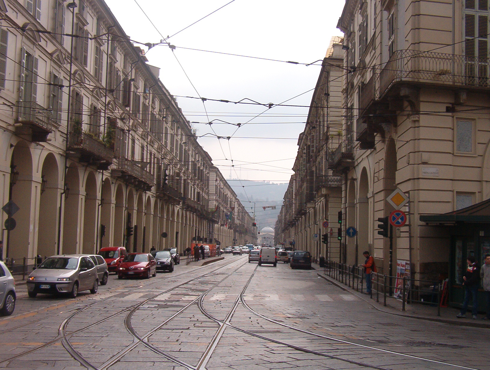 via Po Torino Italia